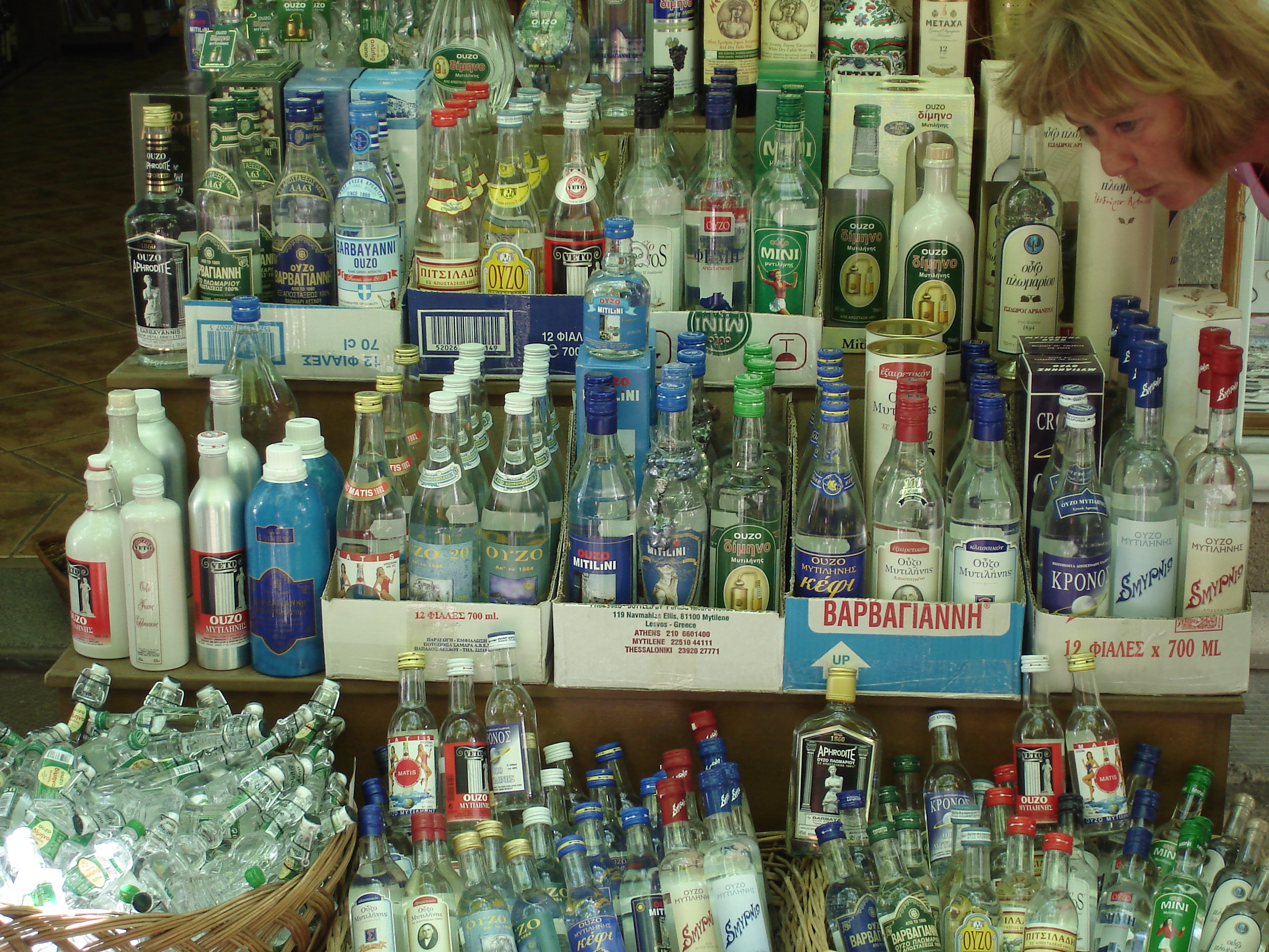 veschillende soorten ouzo